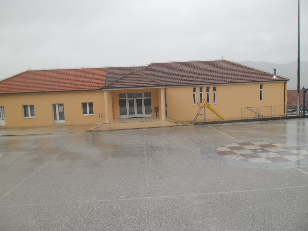 škola u Ponikvama (Ston), Pelješac